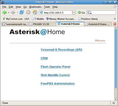 Pagina de configuracion de Asterisk